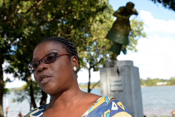 A escritora Conceição Lima no Brasil para participar da 2ª Bienal Brasil do Livro e da Leitura. Foto: Wilson Dias/Agência Brasil